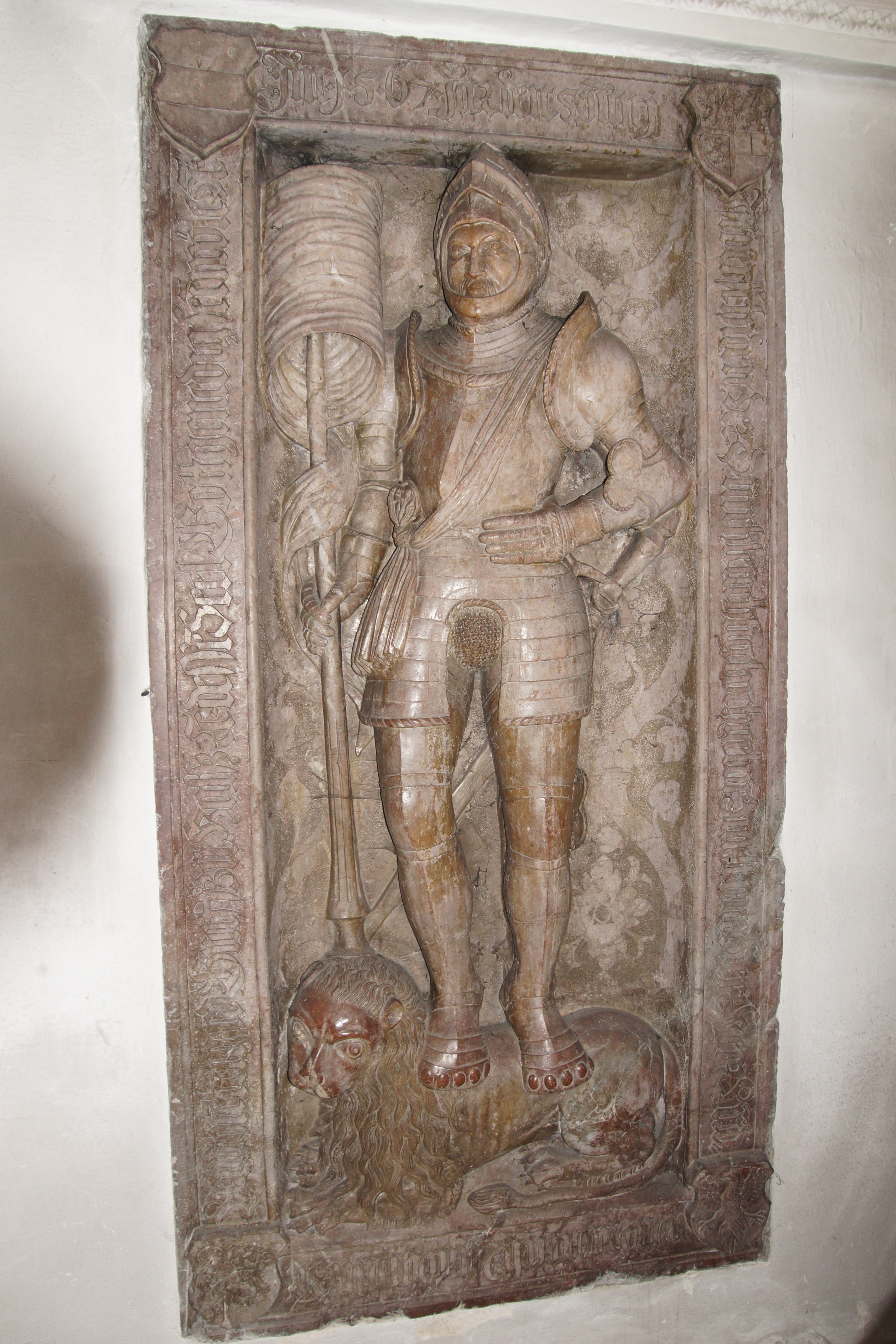 Die katholische Pfarrkirche Mariä Himmelfahrt in Pfreimd